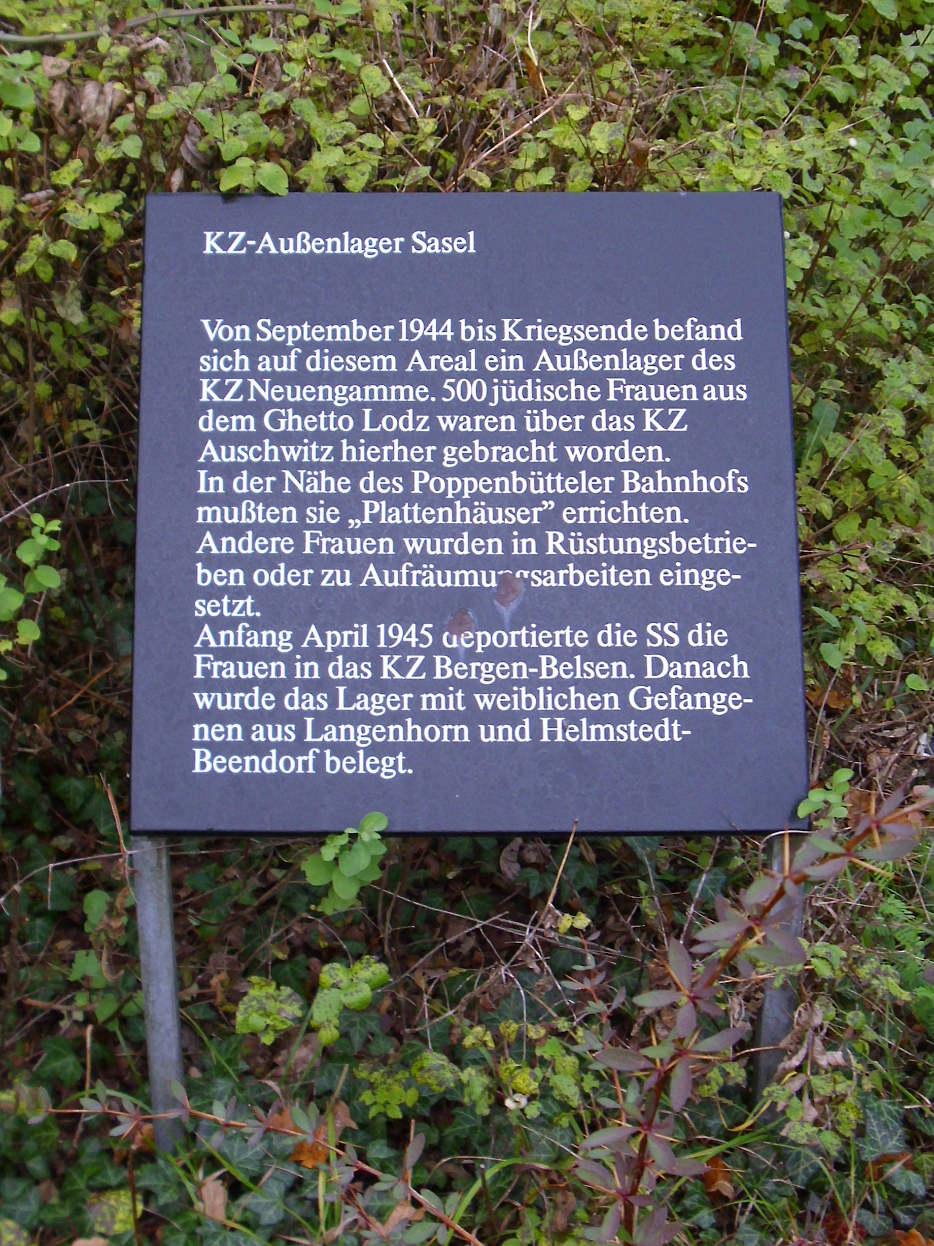 Tafel an der Gedenkstätte für das KZ-Außenlager Sasel, Feldblumenweg Ecke Petunienweg.